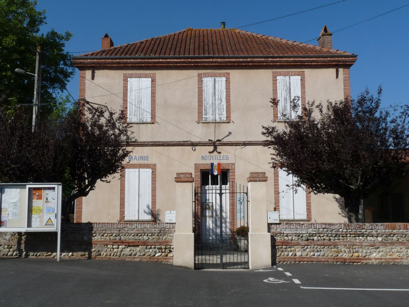 Mairie de Noueilles, Haute-Garonne, France